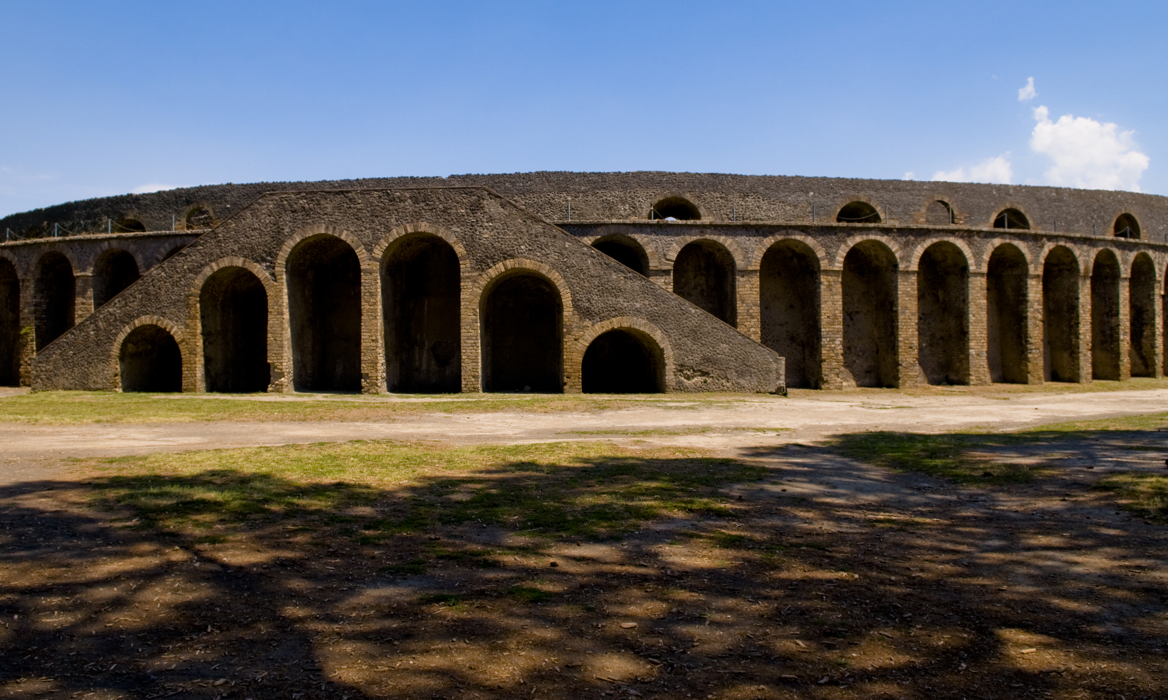 snoozeboy Anfiteatro di Pompei